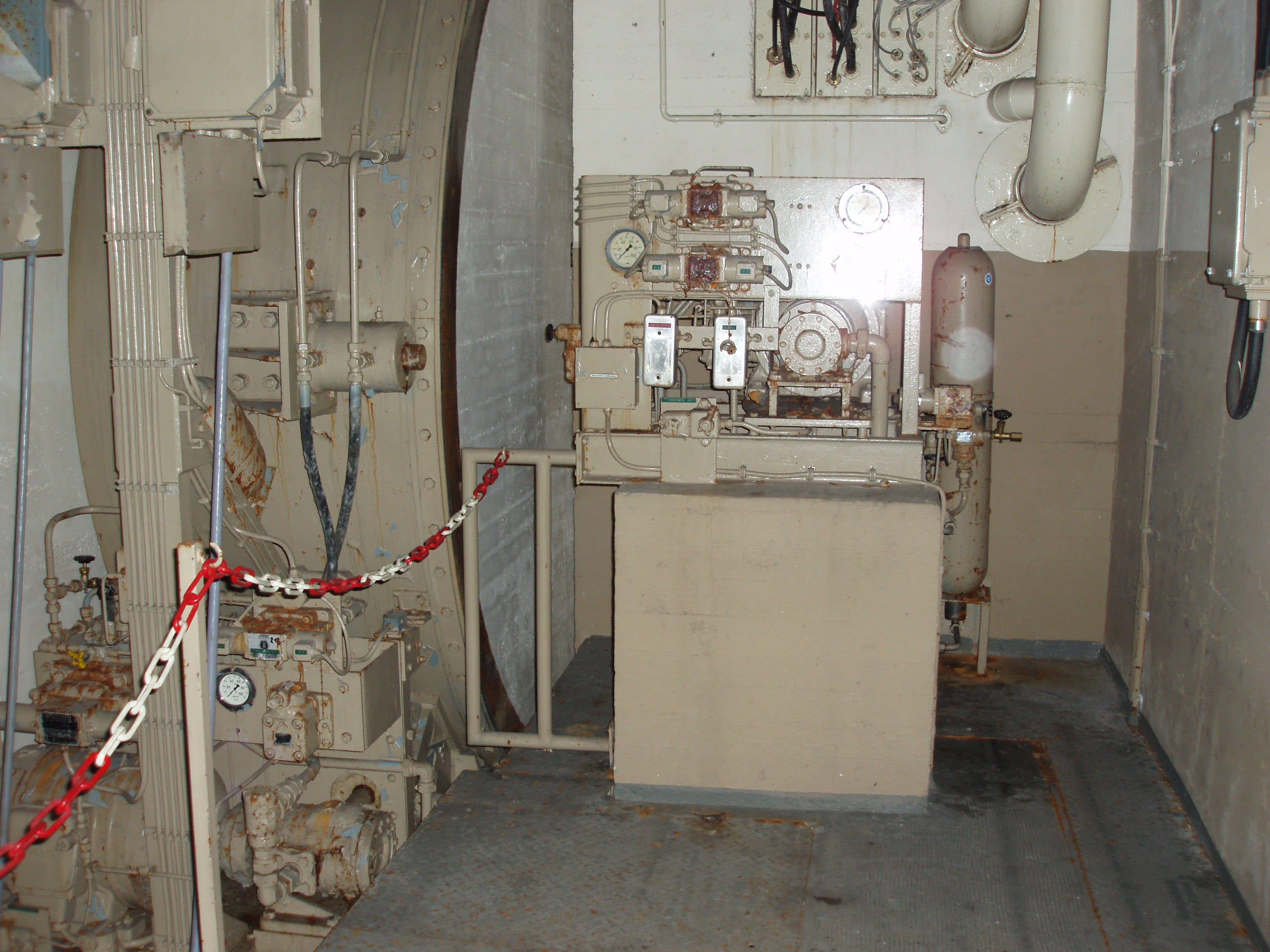 Kontrollraum des Hauptversiegelungstores (links), das den Regierungsbunker in Bad Neuenahr-Ahrweiler innerhalb von Sekunden verschließen konnte.